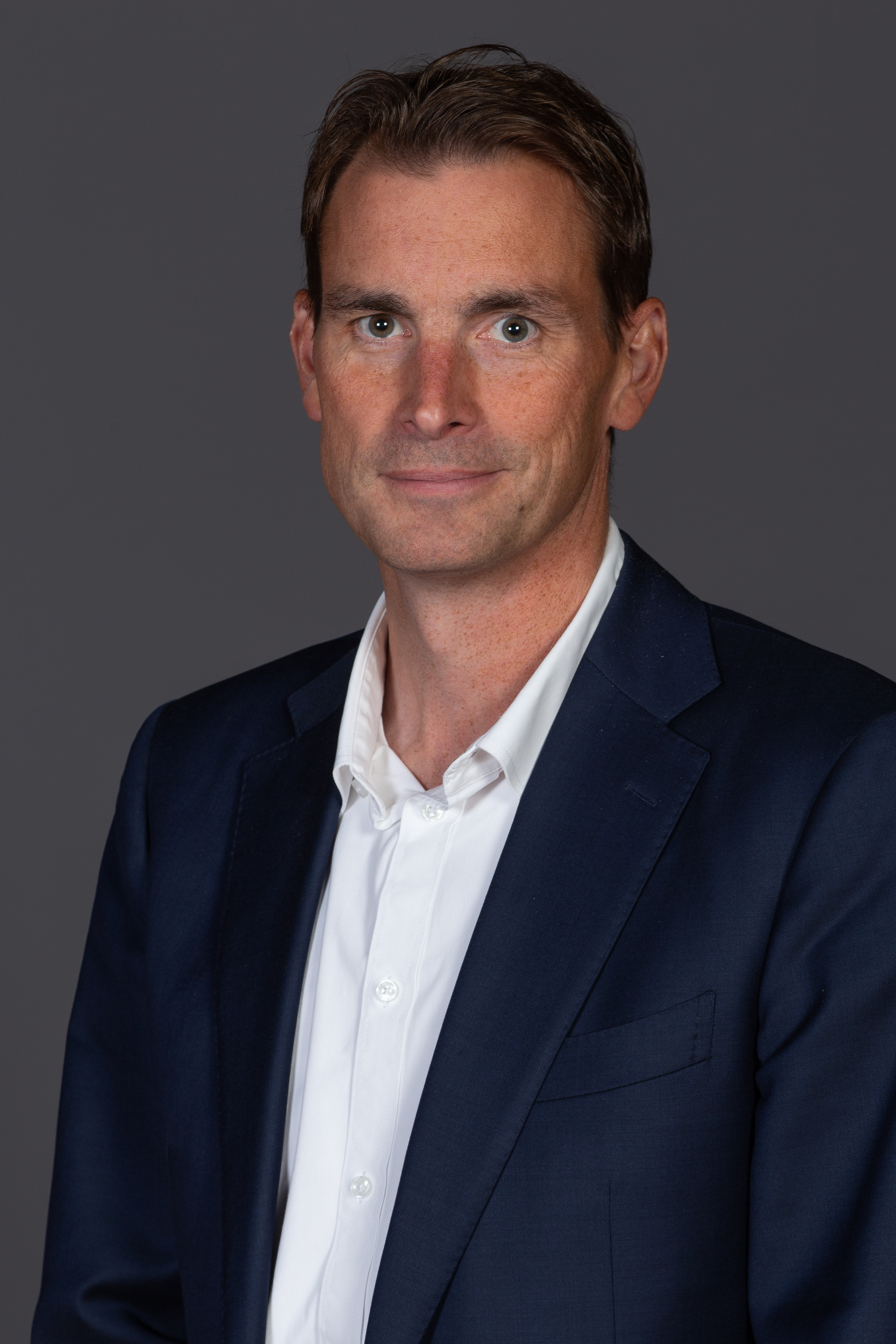 Abgeordnete(r) der Bürgerschaft der Freien und Hansestadt Hamburg Marc Schemmel